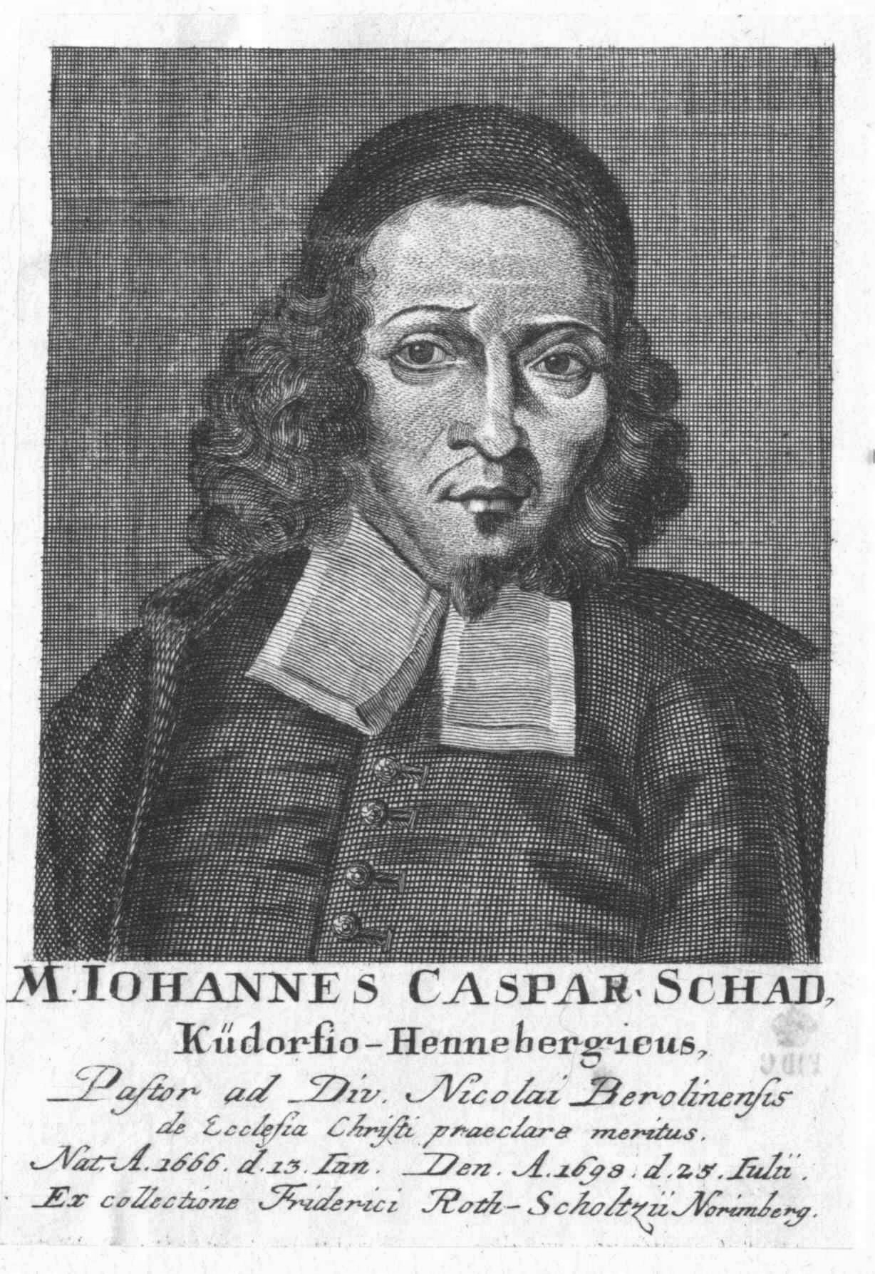 Schade, Johann Caspar; Wien, Österreichische Nationalbibliothek, Bildarchiv und Grafiksammlung, Porträtsammlung, Inventar-Nr. PORT_00133240_01